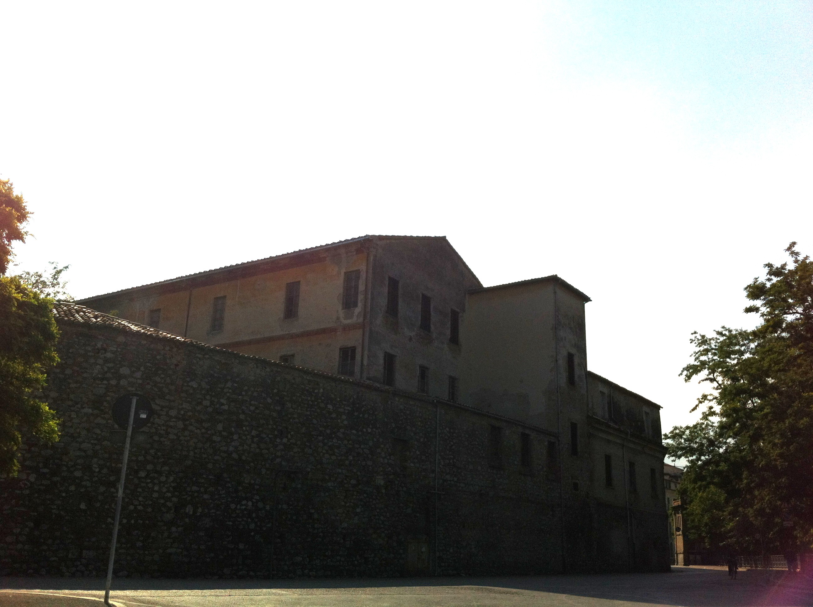 Ala dei semiagitati, poi divenuta refettorio del reparto Tamburini, e Padiglione Giuseppe Cerulli